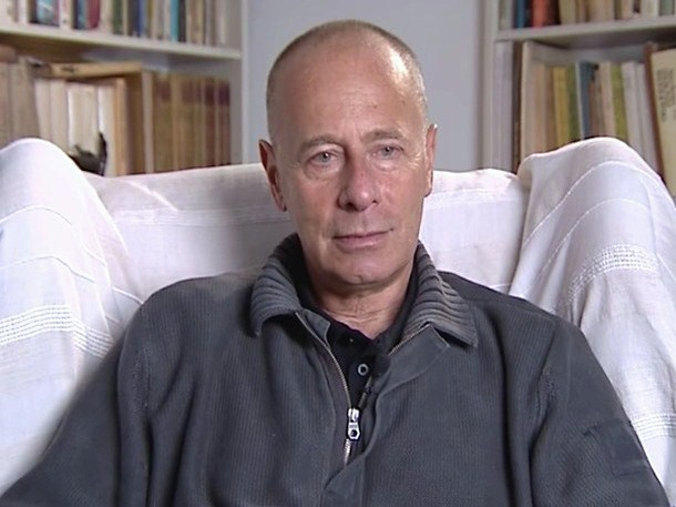 Prof. Jan Grosfeld, ekonomista i działacz katolicki.